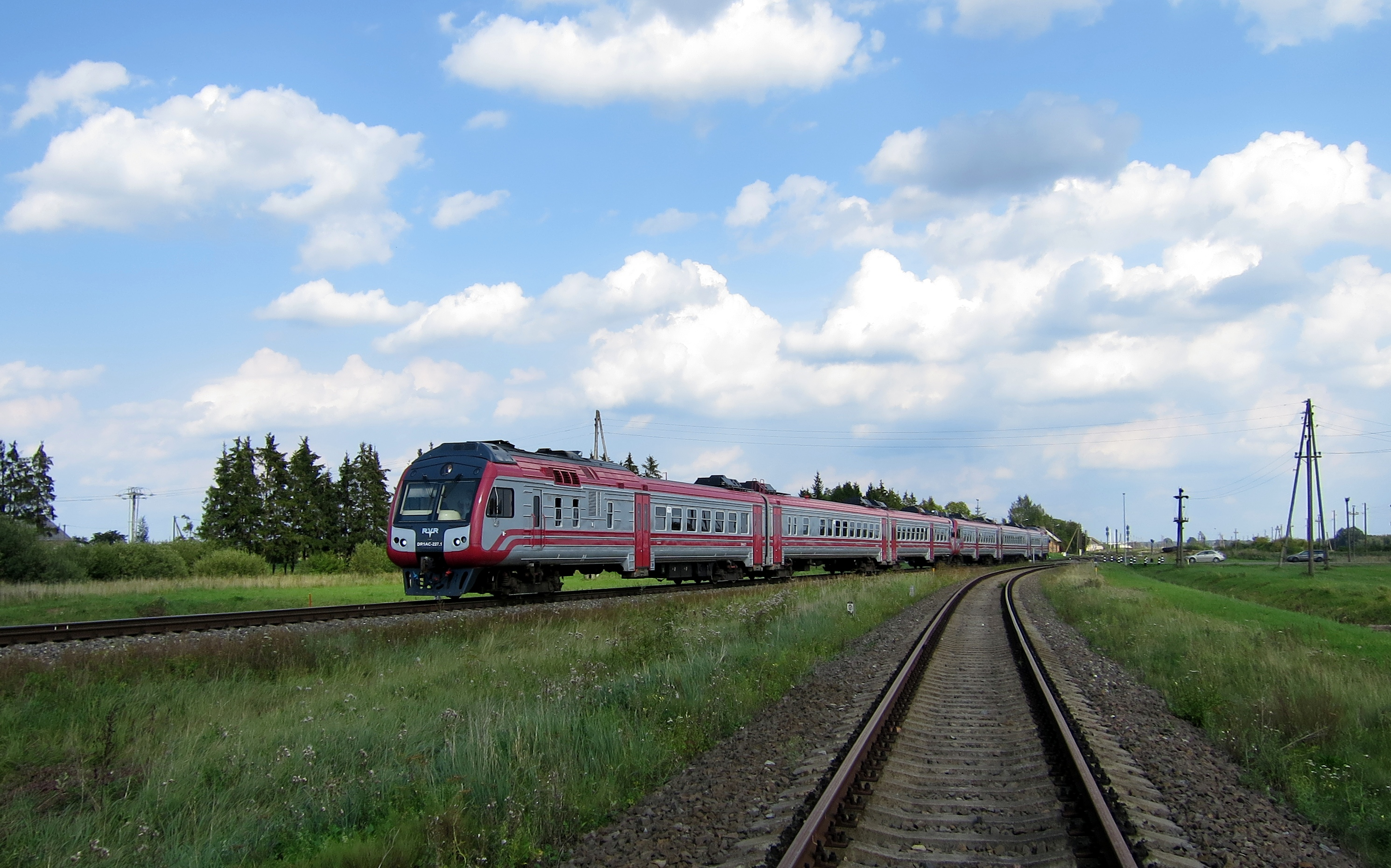 Modernizētais dīzeļvilciens DR1AC reisā uz Liepāju pie Glūdas stacijas